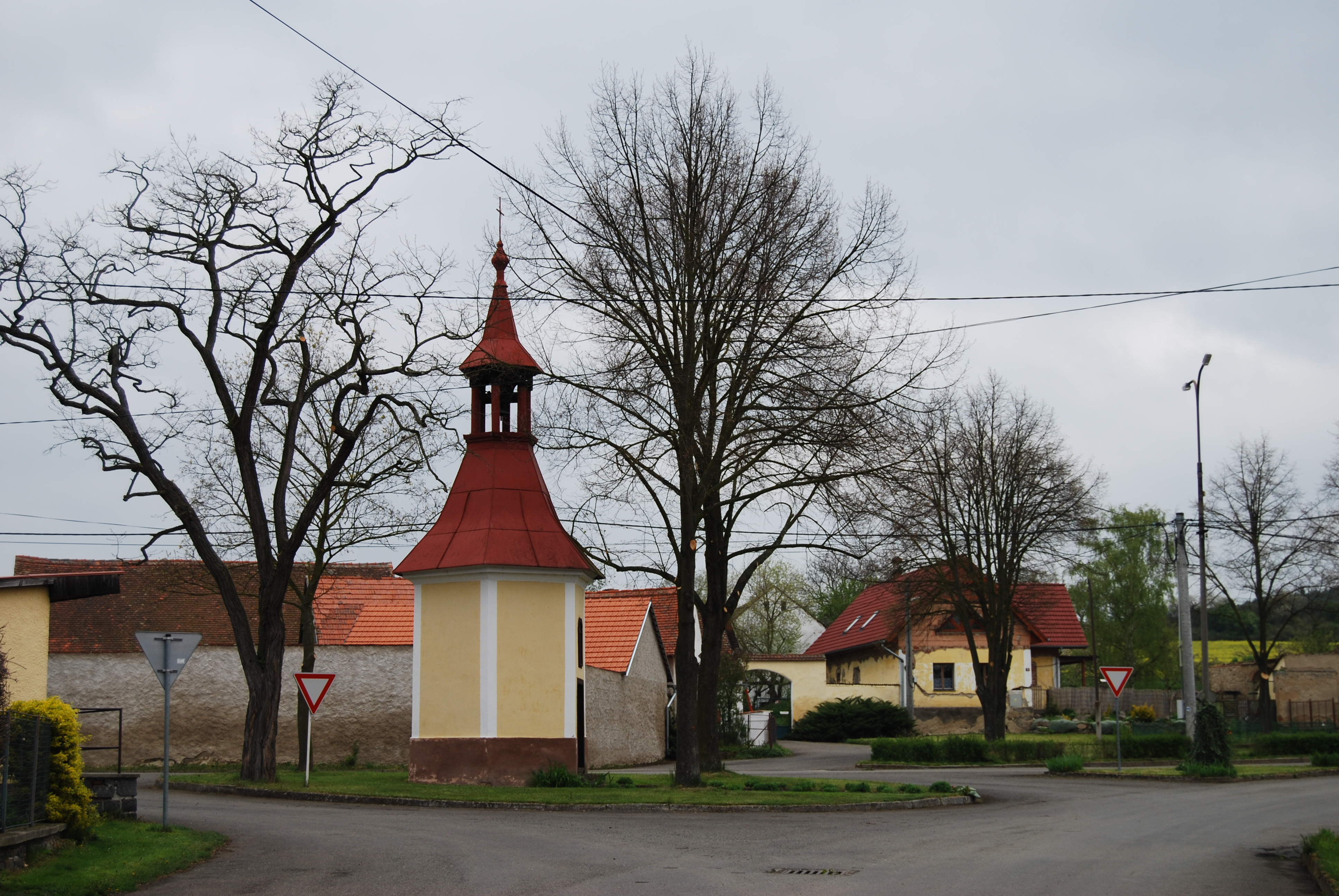 Místní kaple. Křepenice na Sedlčansku v okrese Příbram. Česká republika. - Google Maps - Google Earth